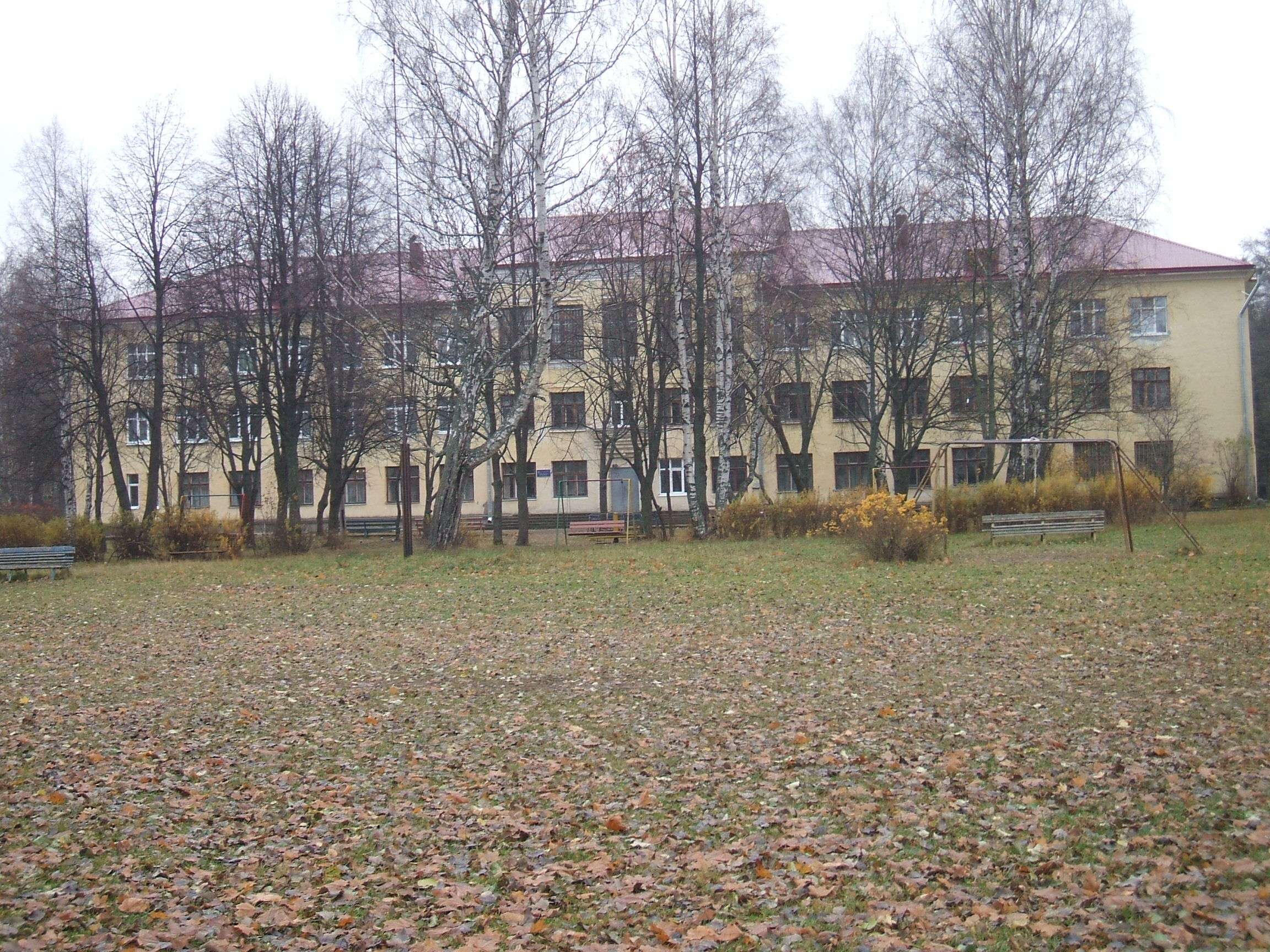 Приморск Лен.обл. Интернат